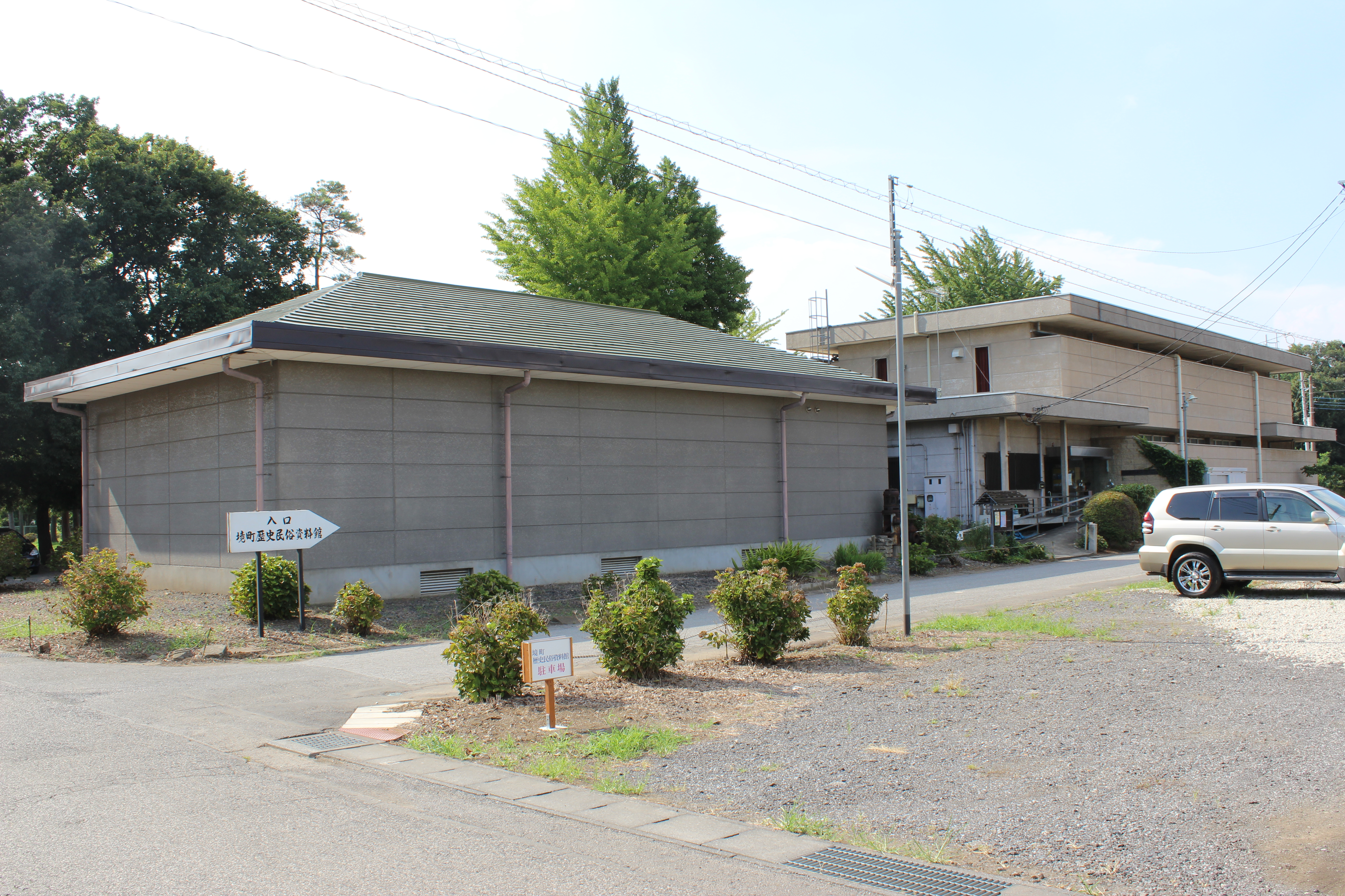 境町歴史民俗資料館（茨城県猿島郡境町大字西泉田1326番地1）